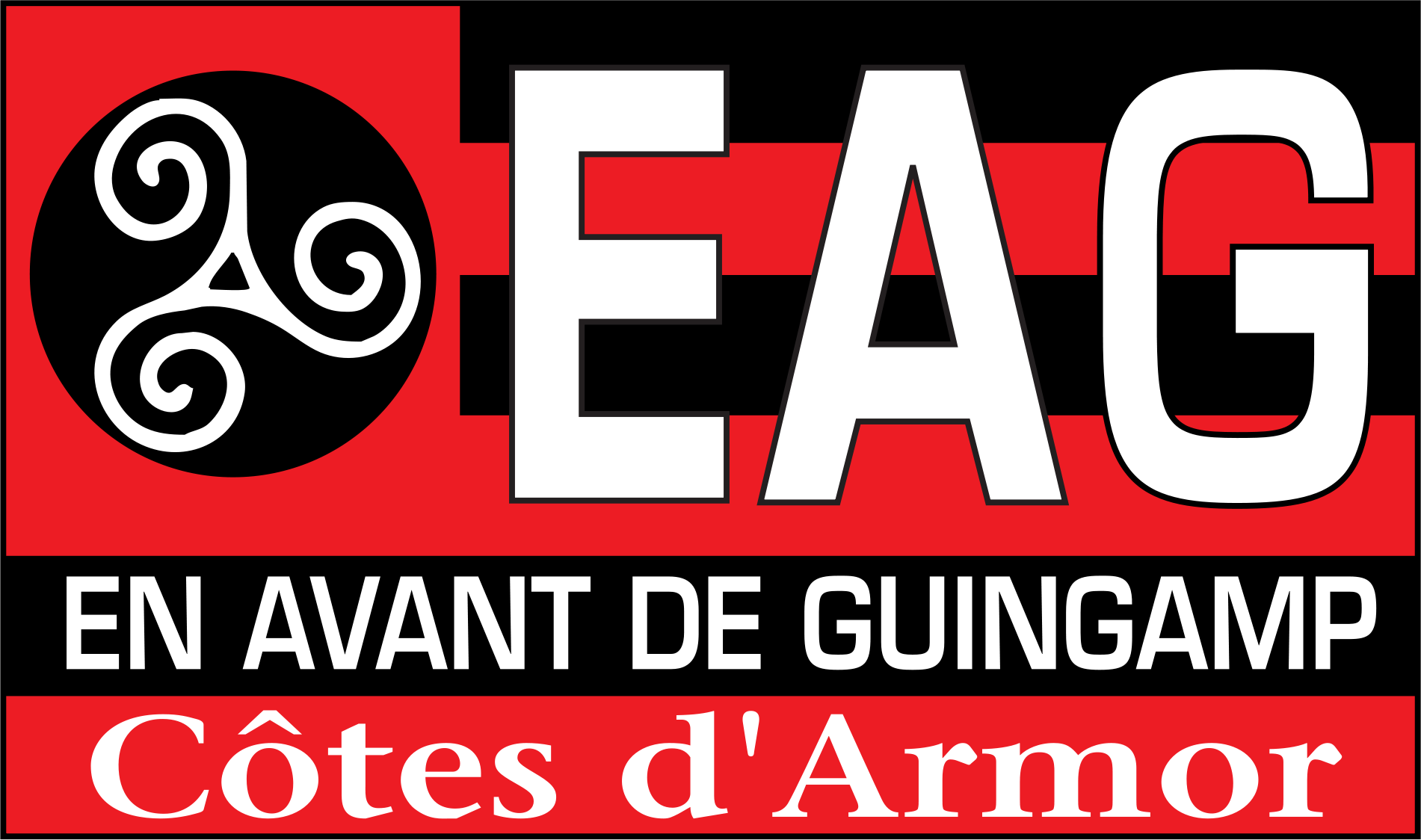 Logo EAG